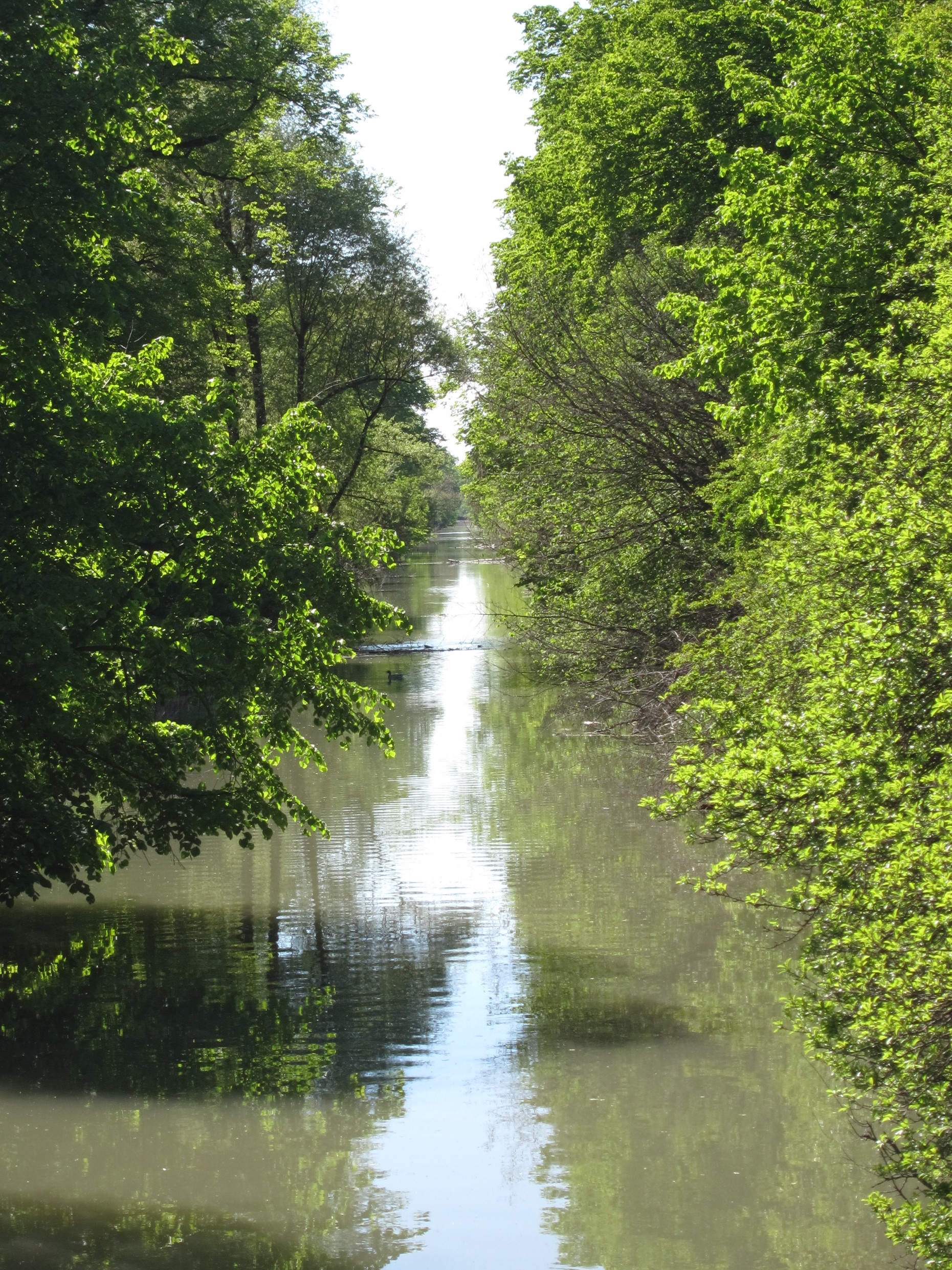 Schleißheimer Kanal, Blick von Hochbrück Richtung Schloss Lustheim